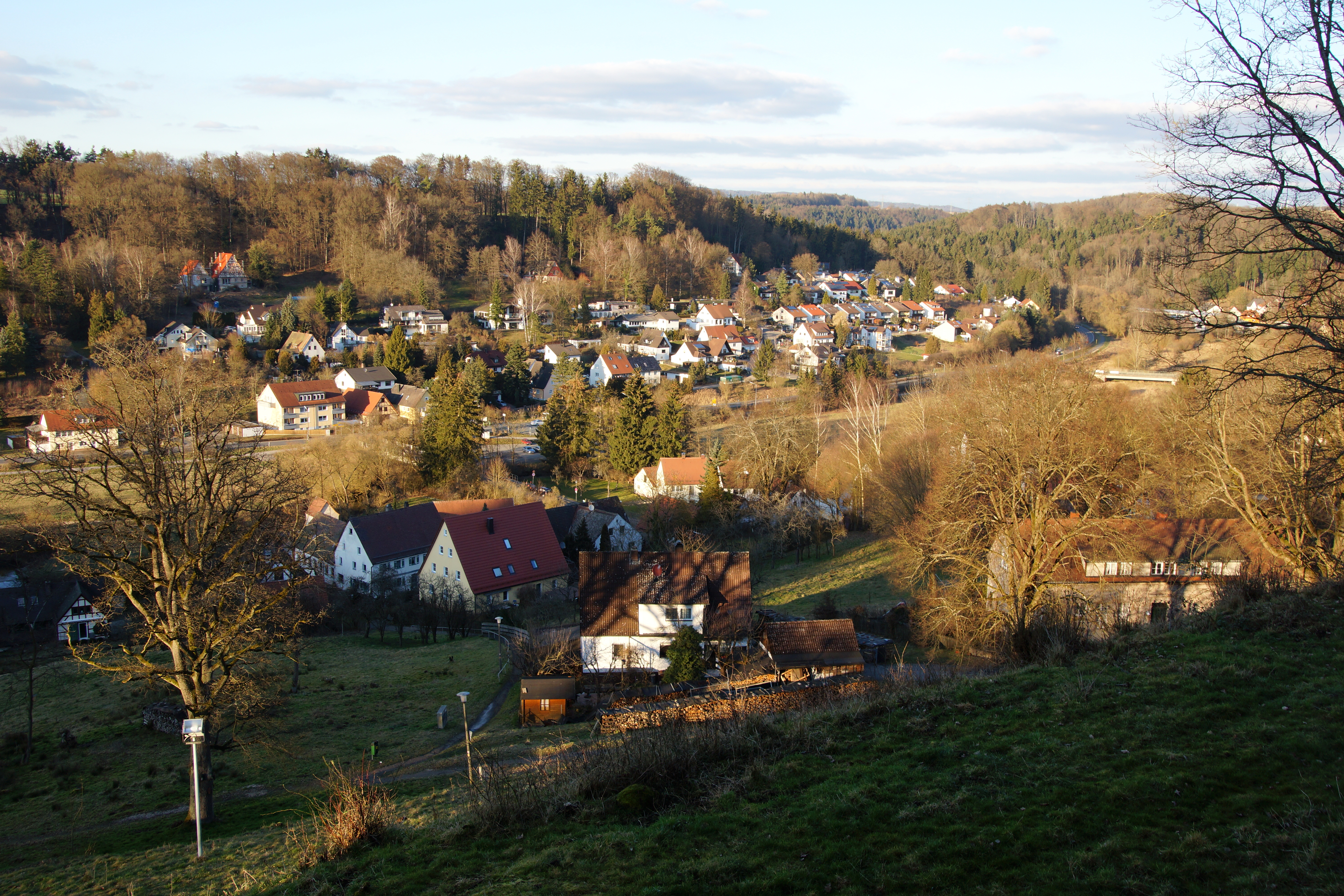 Burgthann - Nürnberger Land: Ausblick von der Burg